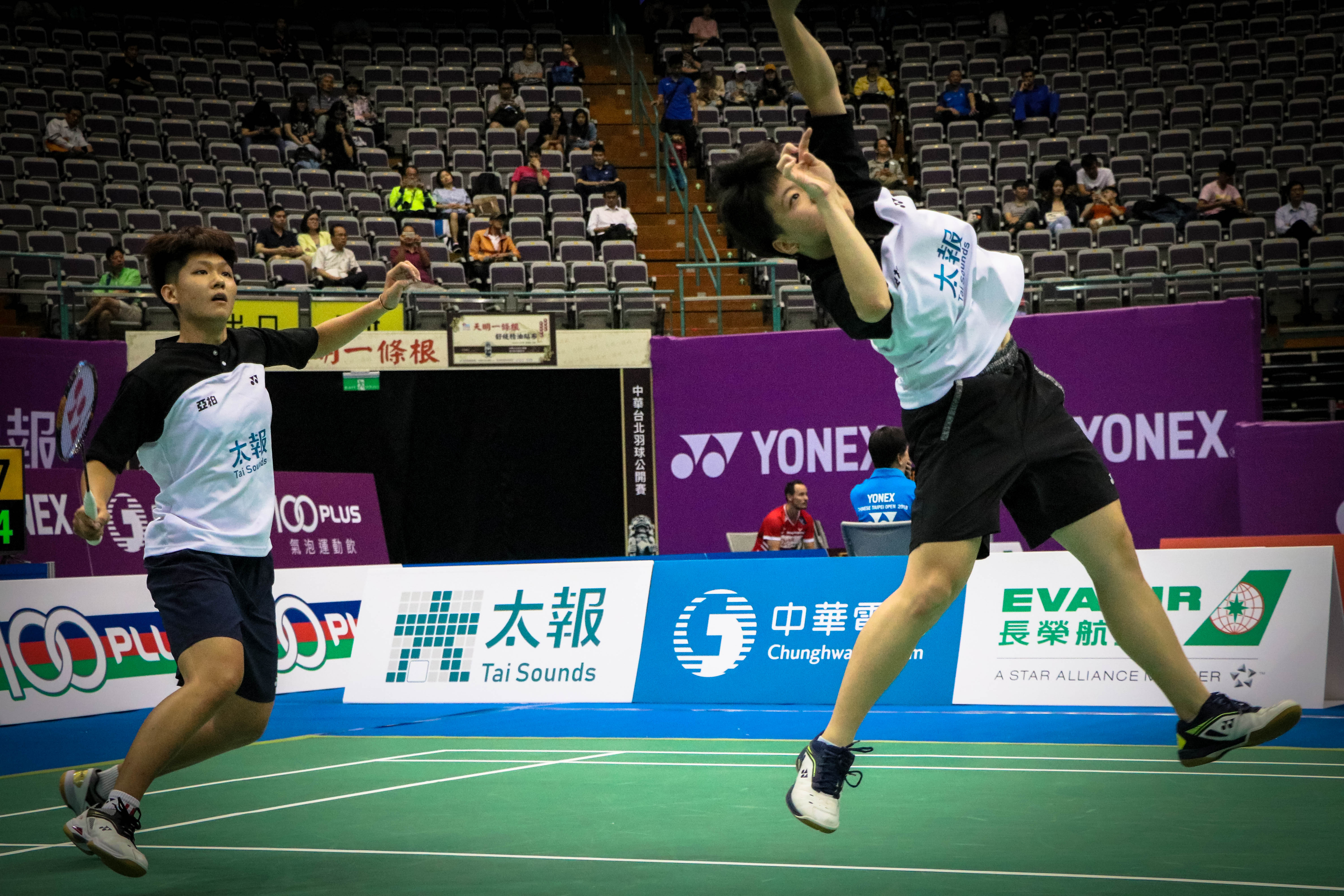 2018 台北OPEN 10/03